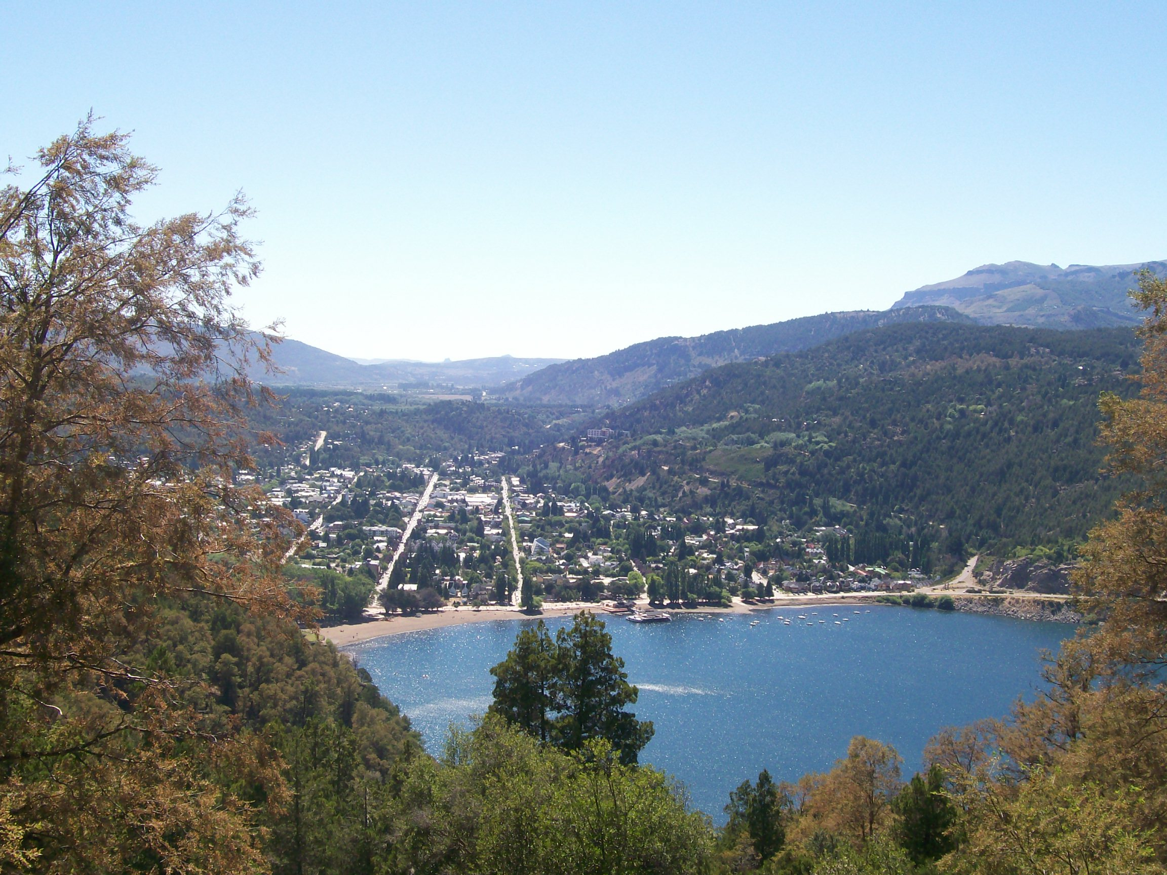 Vista del Lago Lácar y ciudad de San Martín de los Andes.